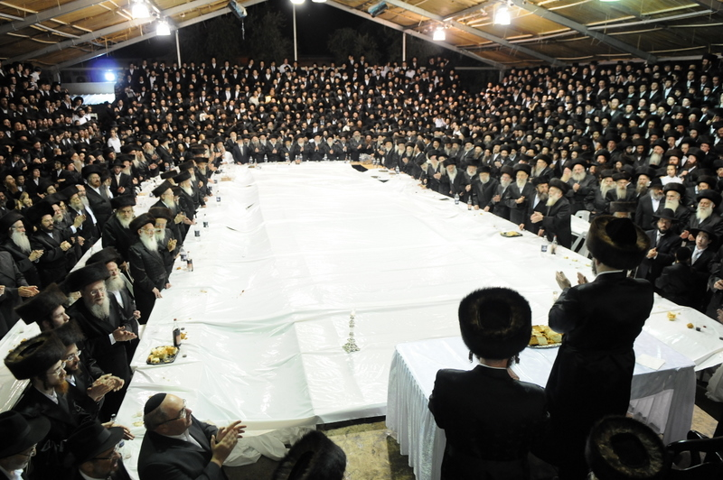 האדמו"ר מבויאן בעת עריכת הטיש, סוכות 2009